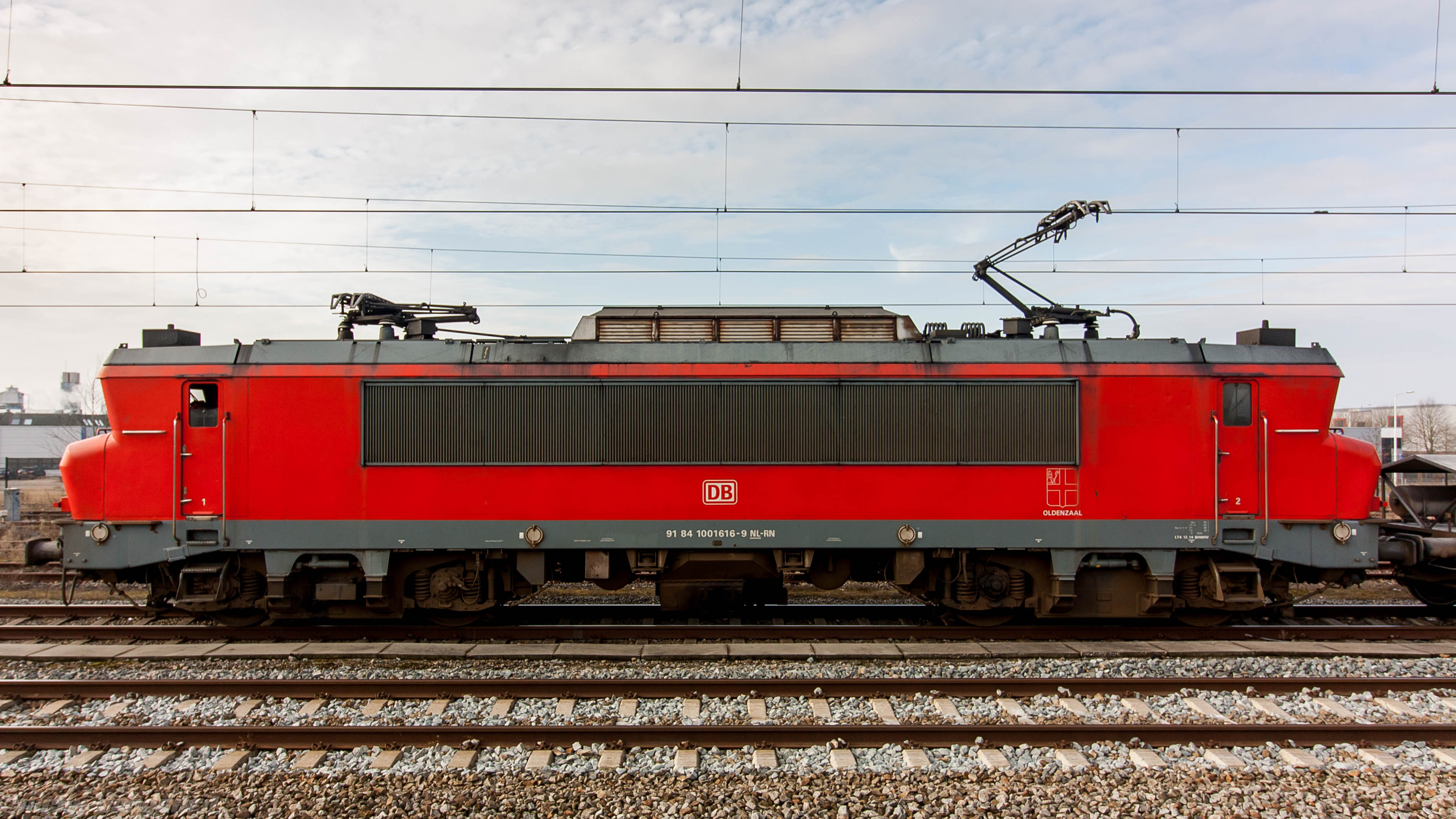 Geldermalsen, the Netherlands